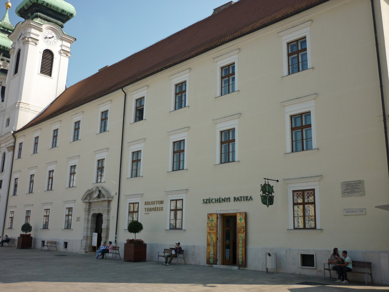 Bencés rendház (Győr, Széchenyi István tér 9.) This is a photo of a monument in Hungary. Identifier: 4395